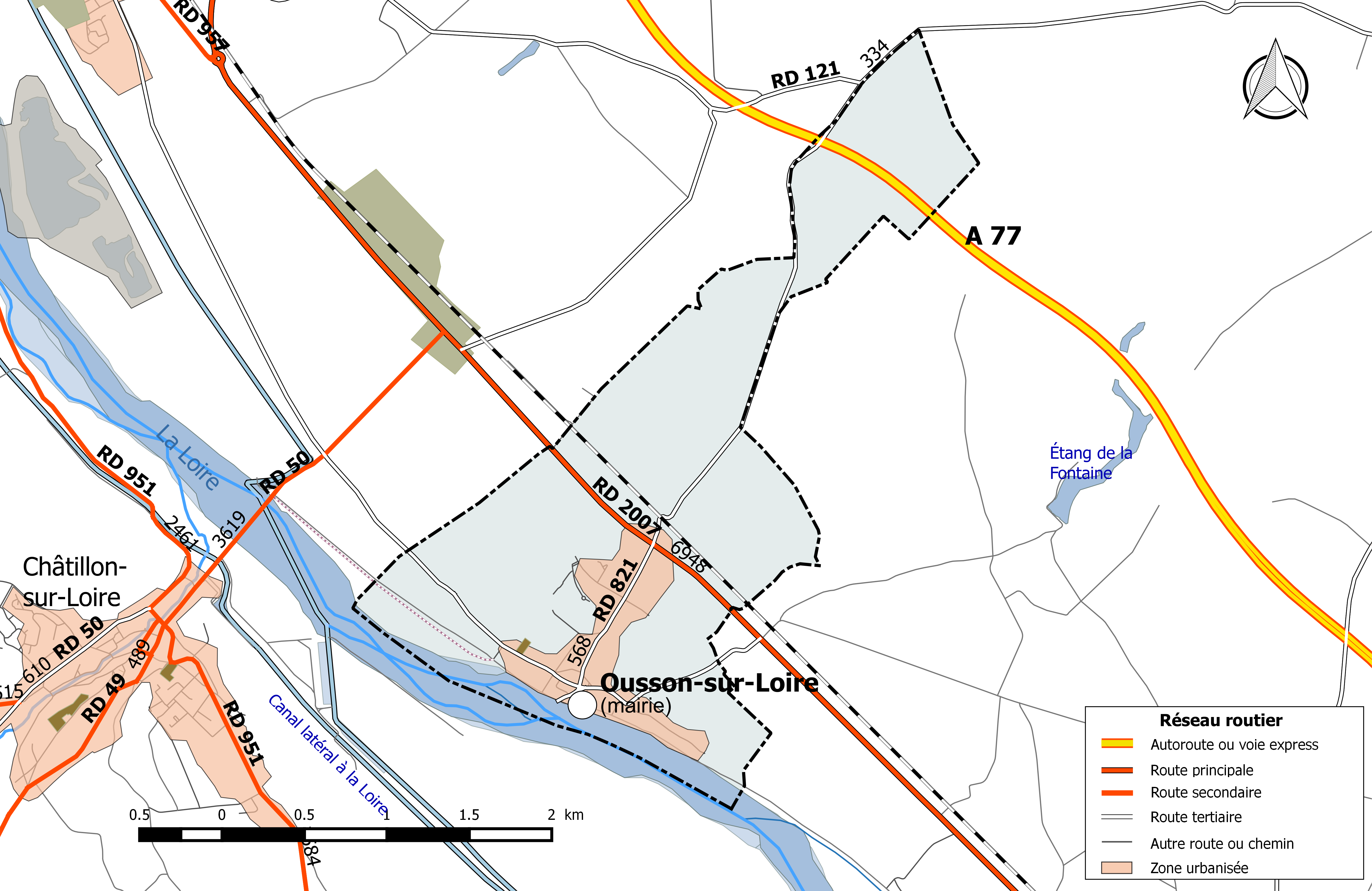 Carte du réseau routier de la commune de Ousson-sur-Loire.